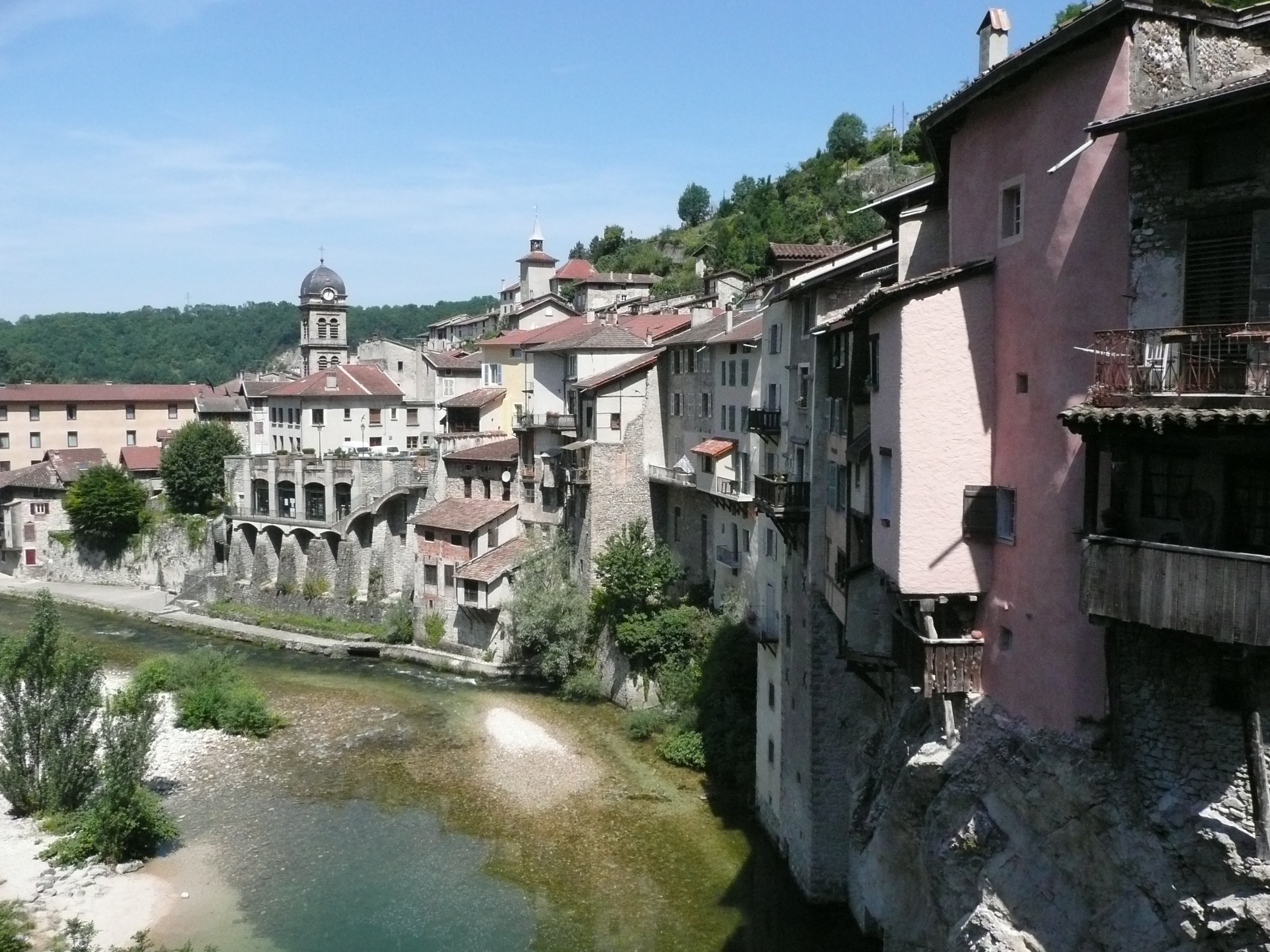 vue de Pont-en-Royans dans la Drôme